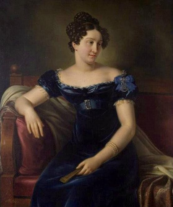 Елизавета Николаевна Потоцкая, урож. Головина (1795-1867), дочь мемуаристки В.Н.Головиной, жена Л.С.Потоцкого.